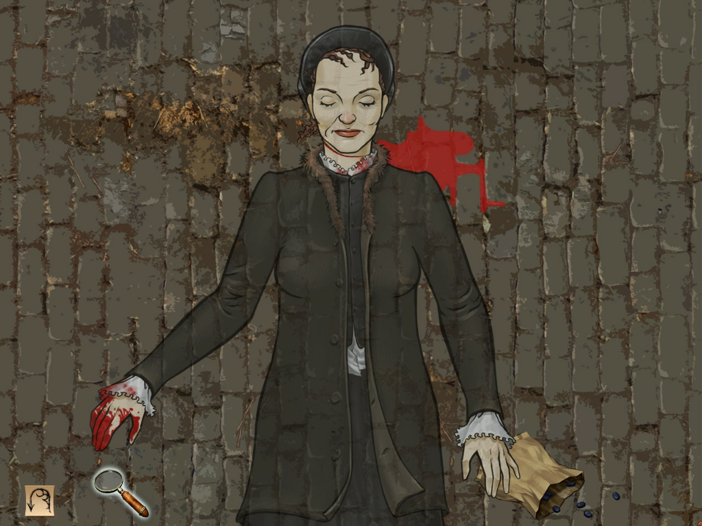 Capture d'écran du jeu Sherlock Holmes contre Jack l'Éventreur. Dessin d'Elizabeth Stride, troisième victime attribuée à "jack l'Éventreur". Le paquet de cachous que la victime tenait dans sa main gauche a aussi été dessiné.